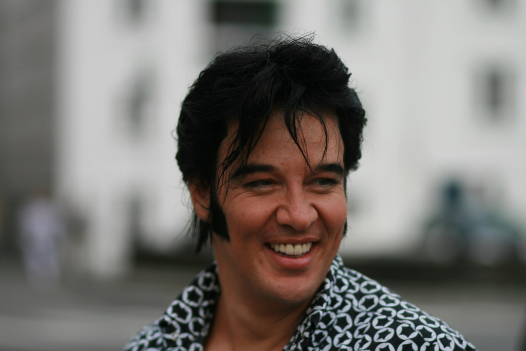 Kjell Elvis In Stavanger , best Elvis imitator in Europe